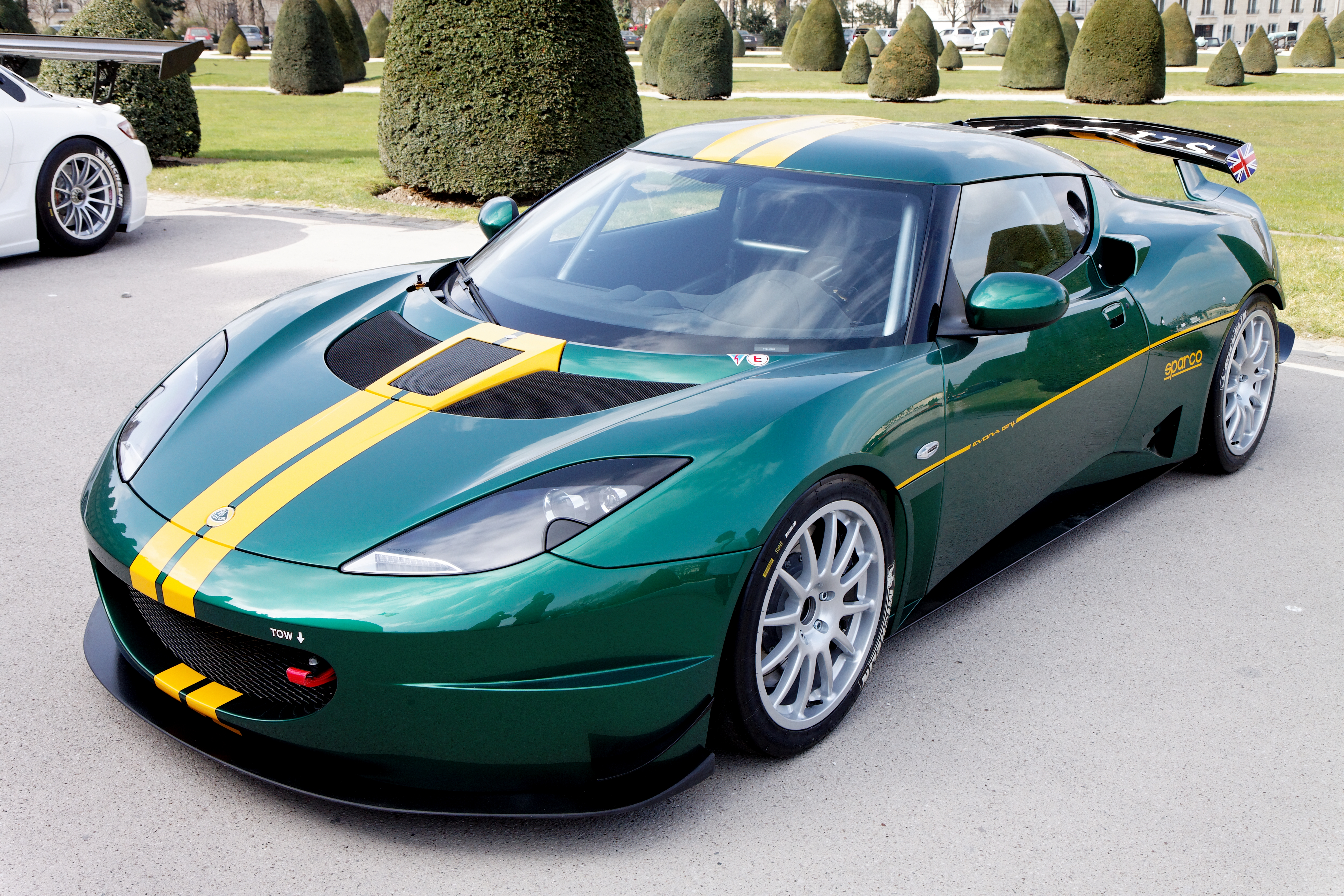 Photographie prise lors de la présentation du Blancpain Endurance series aux Invalides à Paris en mars 2011.